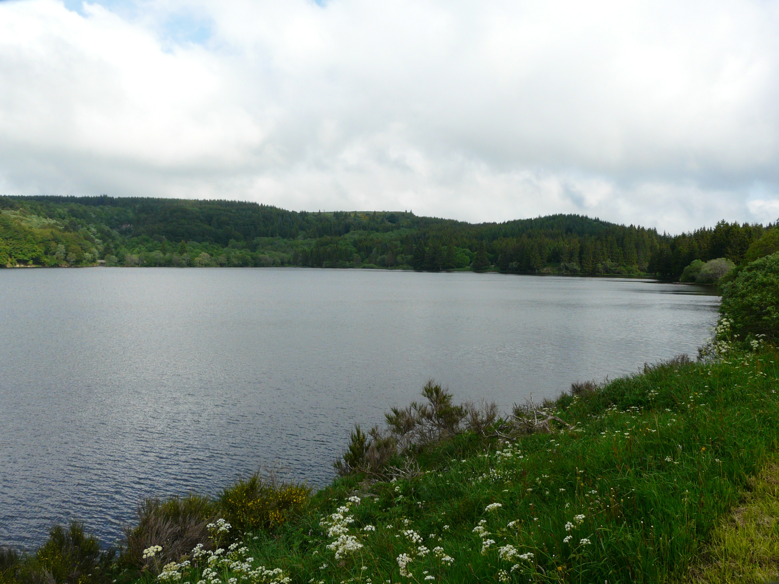 La partie nord du lac de Guéry, partagée entre les communes de Perpezat (collines au fond) et d'Orcival (rive sur la droite) Puy-de-Dôme, France.